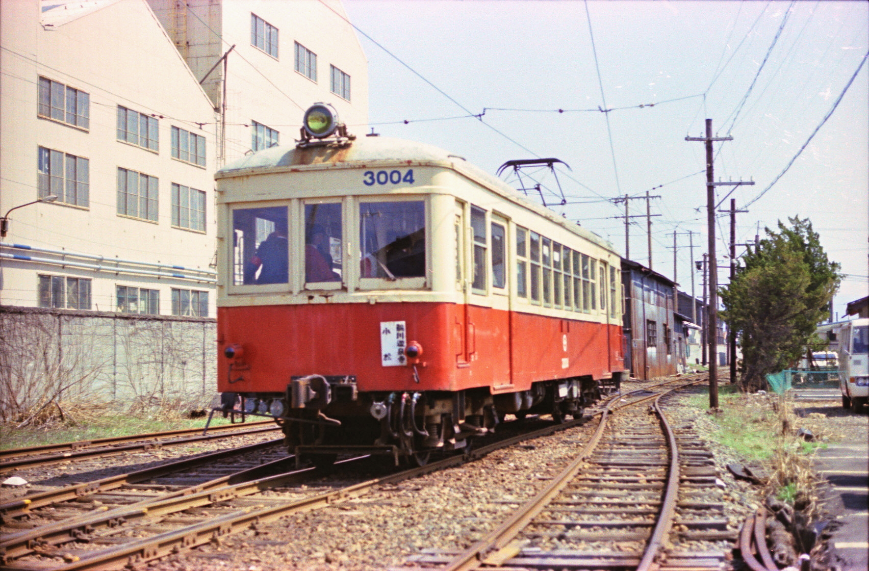 北陸鉄道小松線 小松駅付近 モハ3000形電車